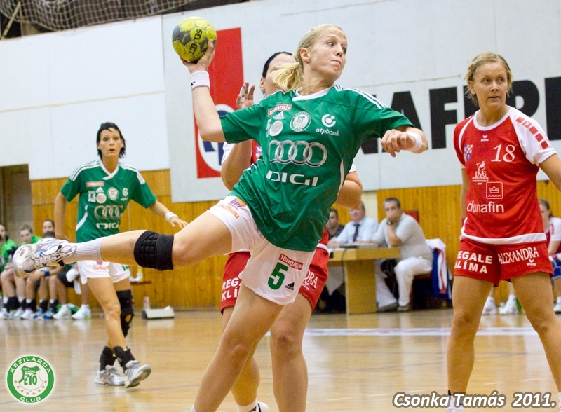 Anita Görbicz, Heidi Løke